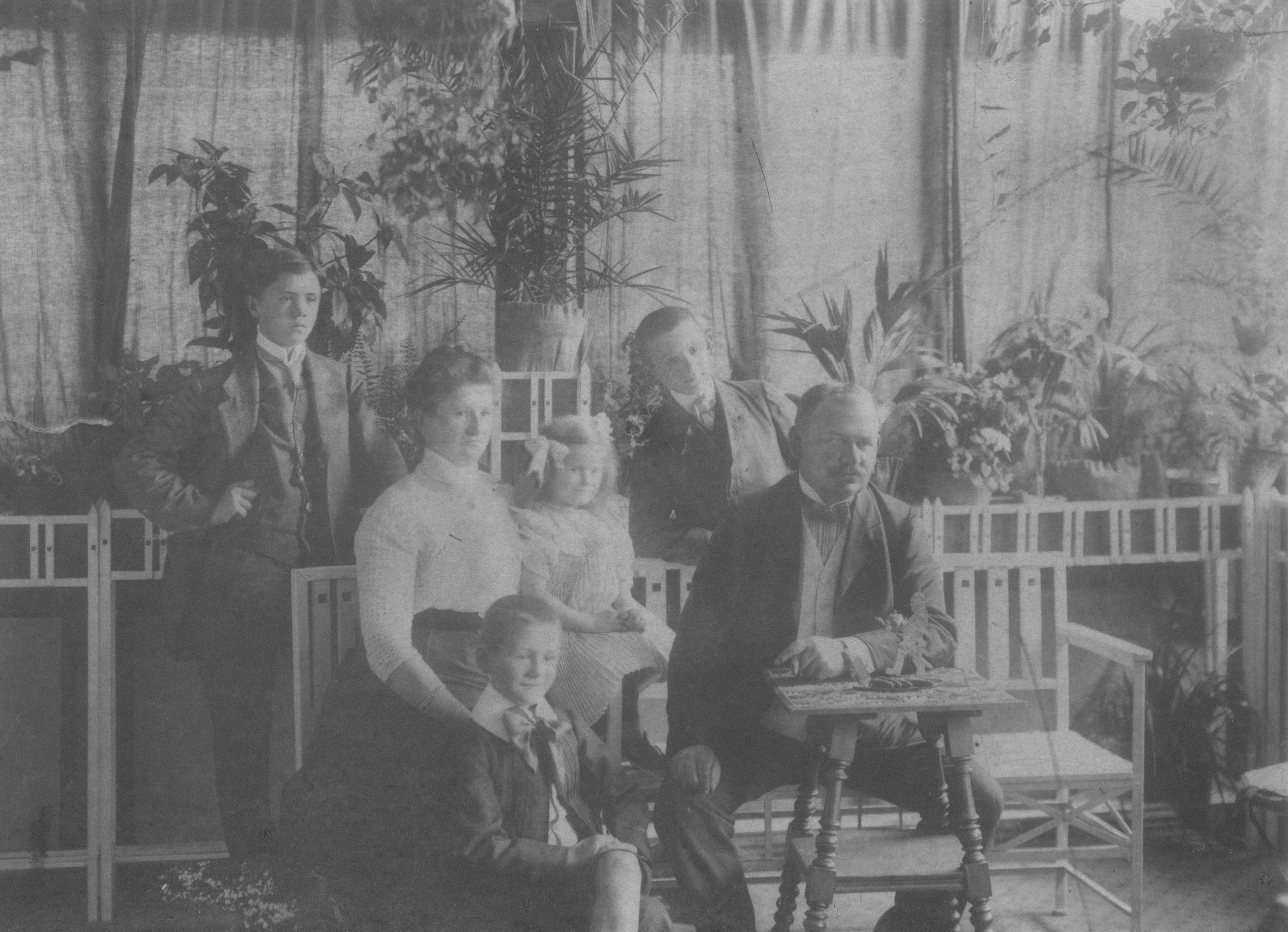 Familie des Firmengründers und ab 1920 Kommerzienrates Sigmund Scherdel